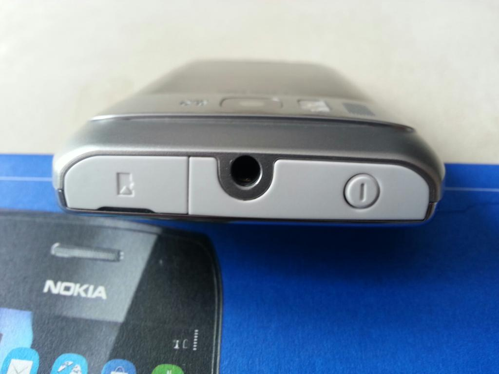 Nokia E6 białą góra telefonu